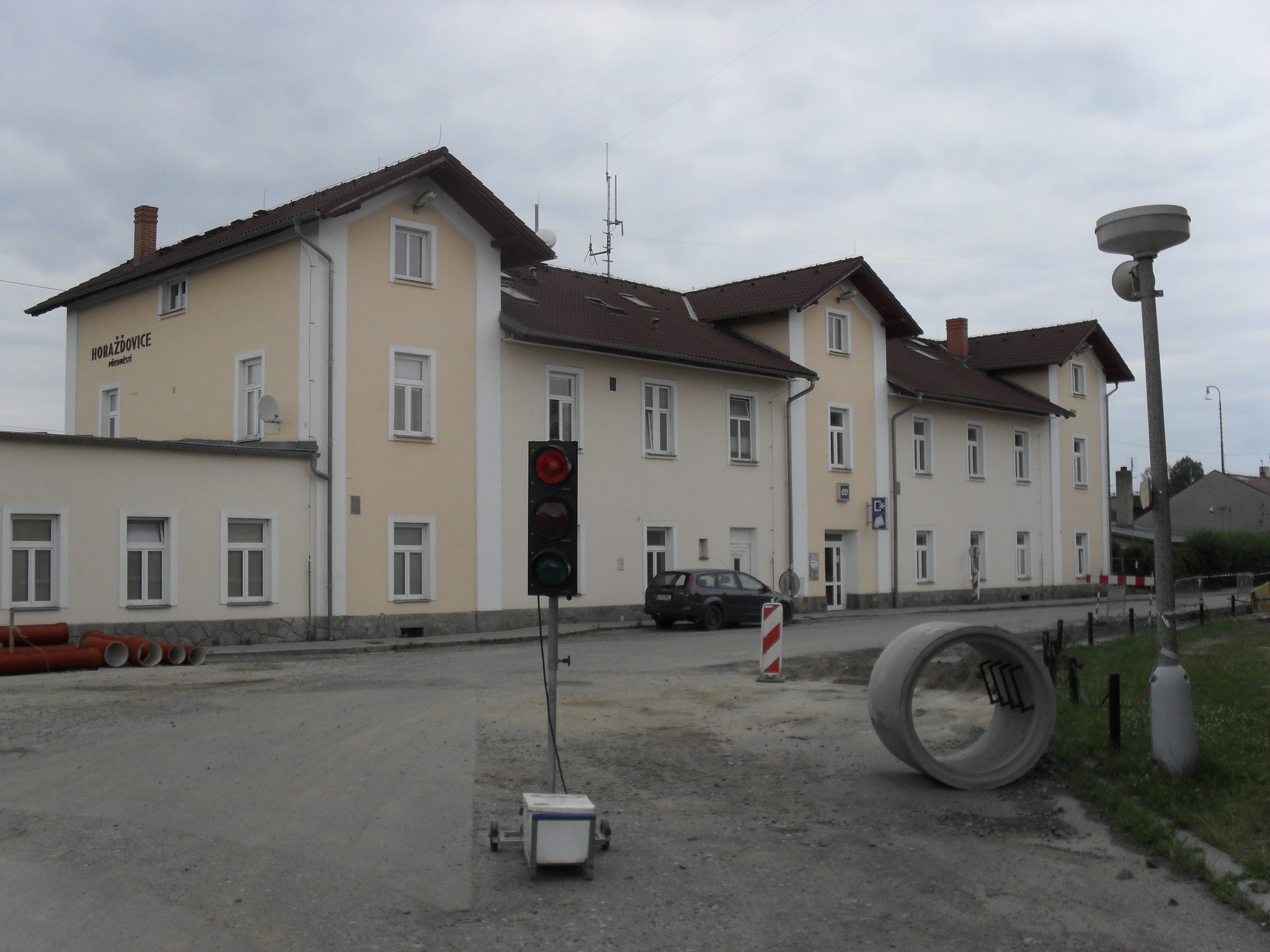 Fotografie Horažďovického předměstí.